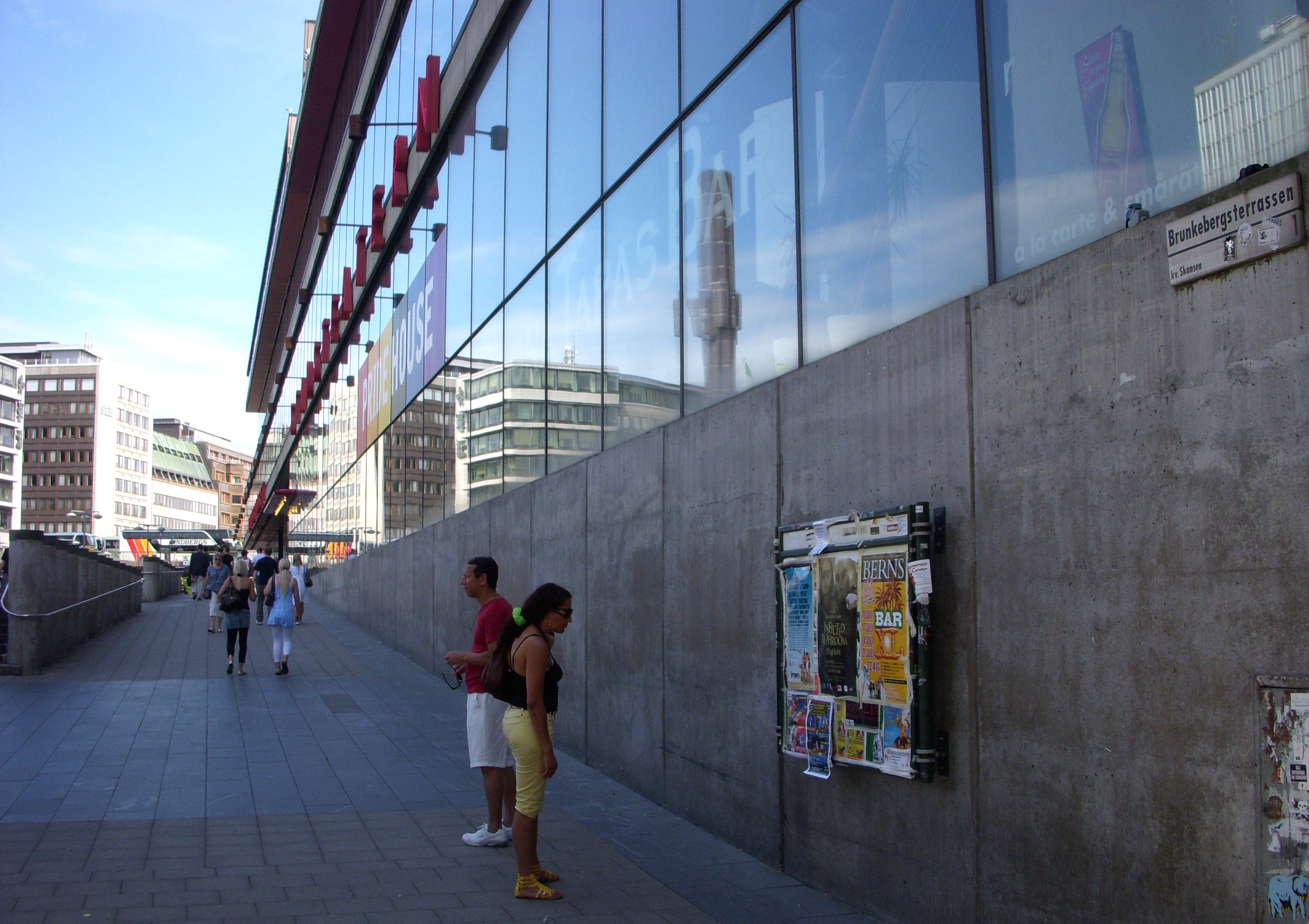 Brunkebergsterrassen i Stockholm